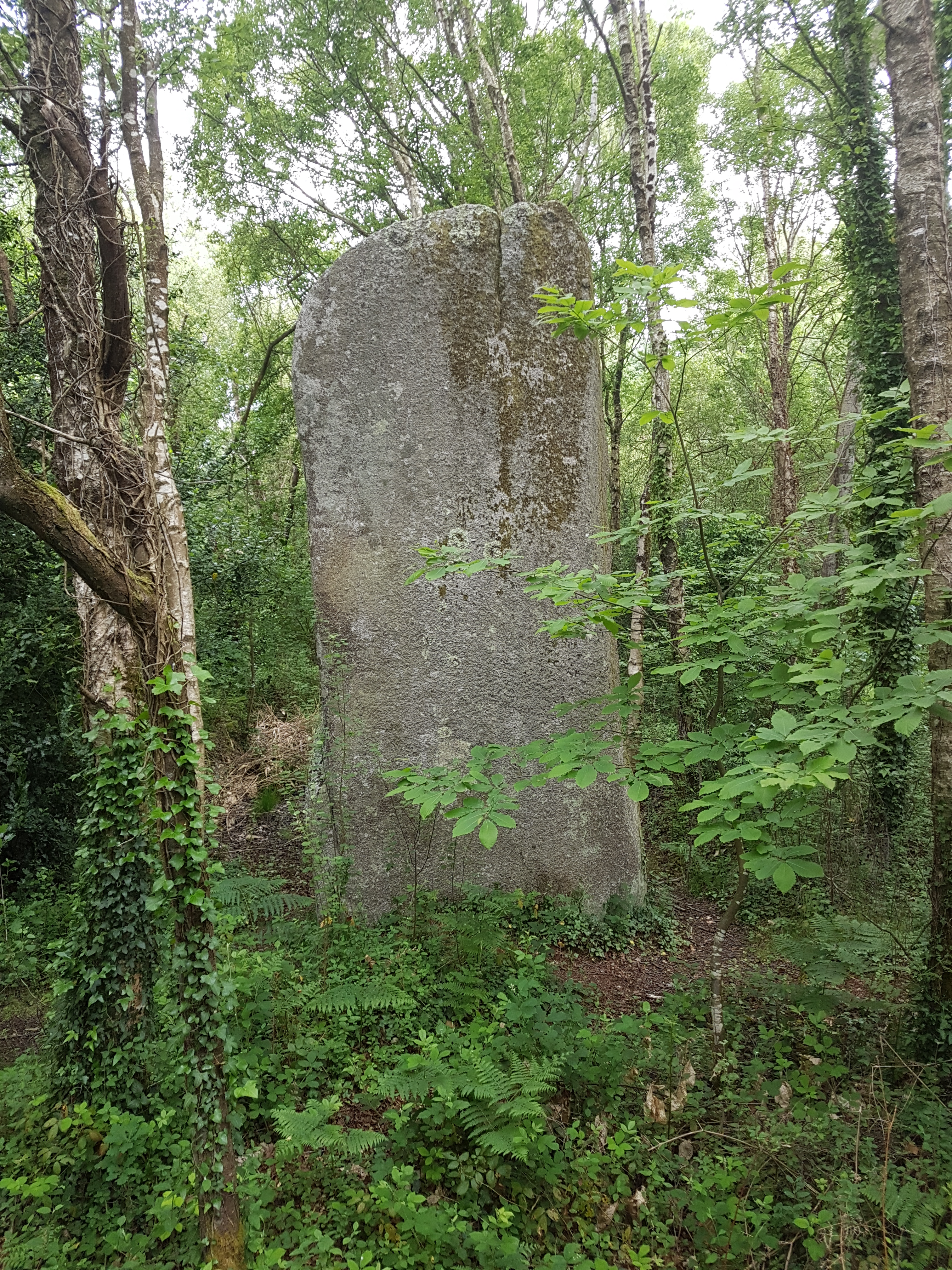 photo du menhier de lann ar peulven